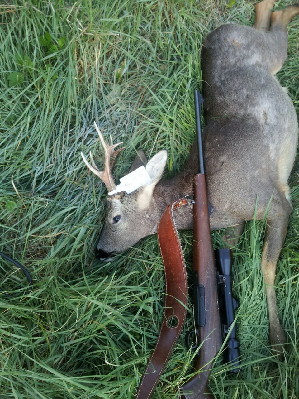 Corzo abatido en el término municipal de Villafranca de la Sierra (Ávila; España)